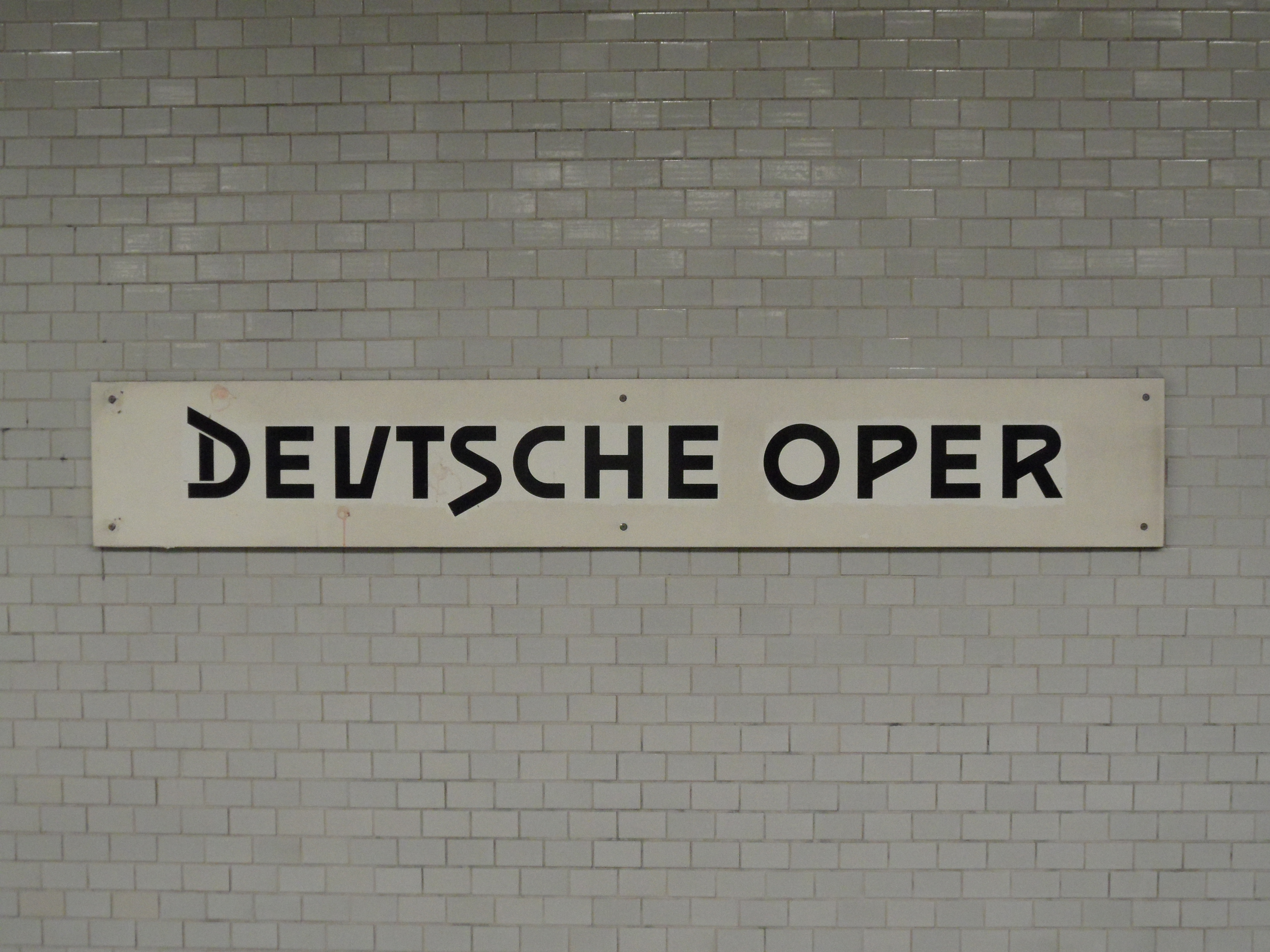 Berlin - U-Bahnhof Deutsche Oper - Linie U2